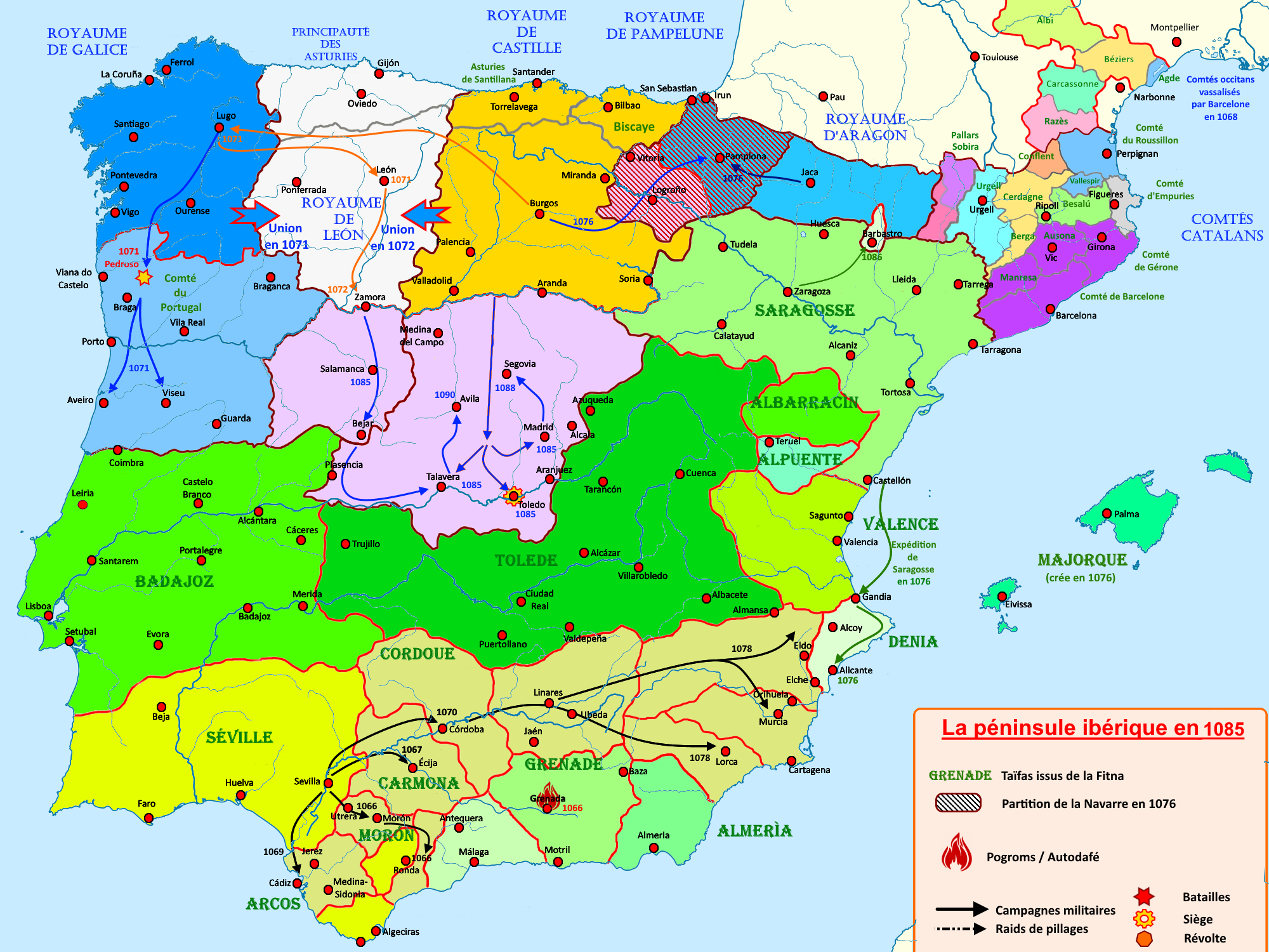 Carte de la péninsule ibérique de 1065 à 1085 présentant les principaux évènements de la période